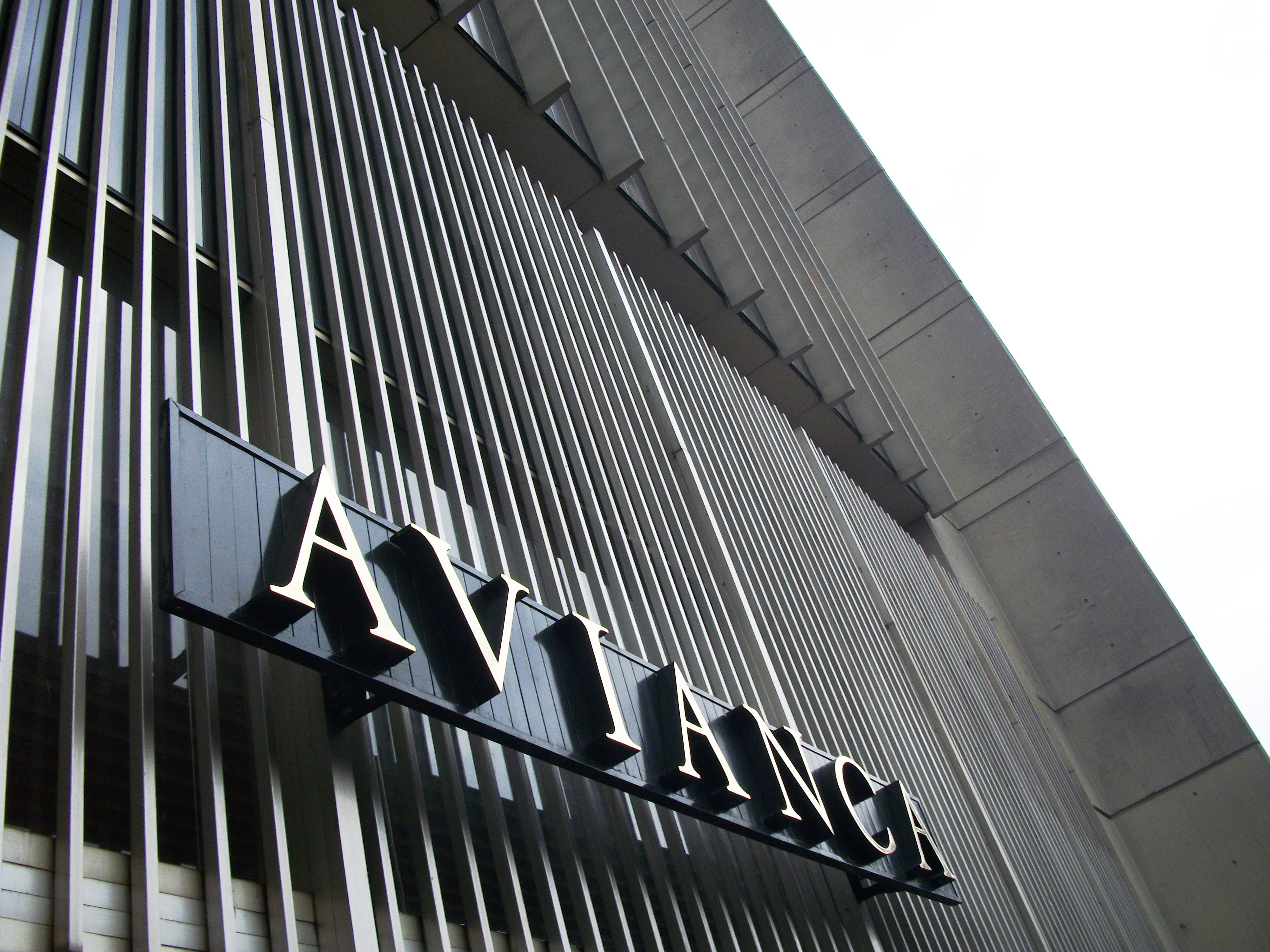 Letrero en el edificio de Avianca.